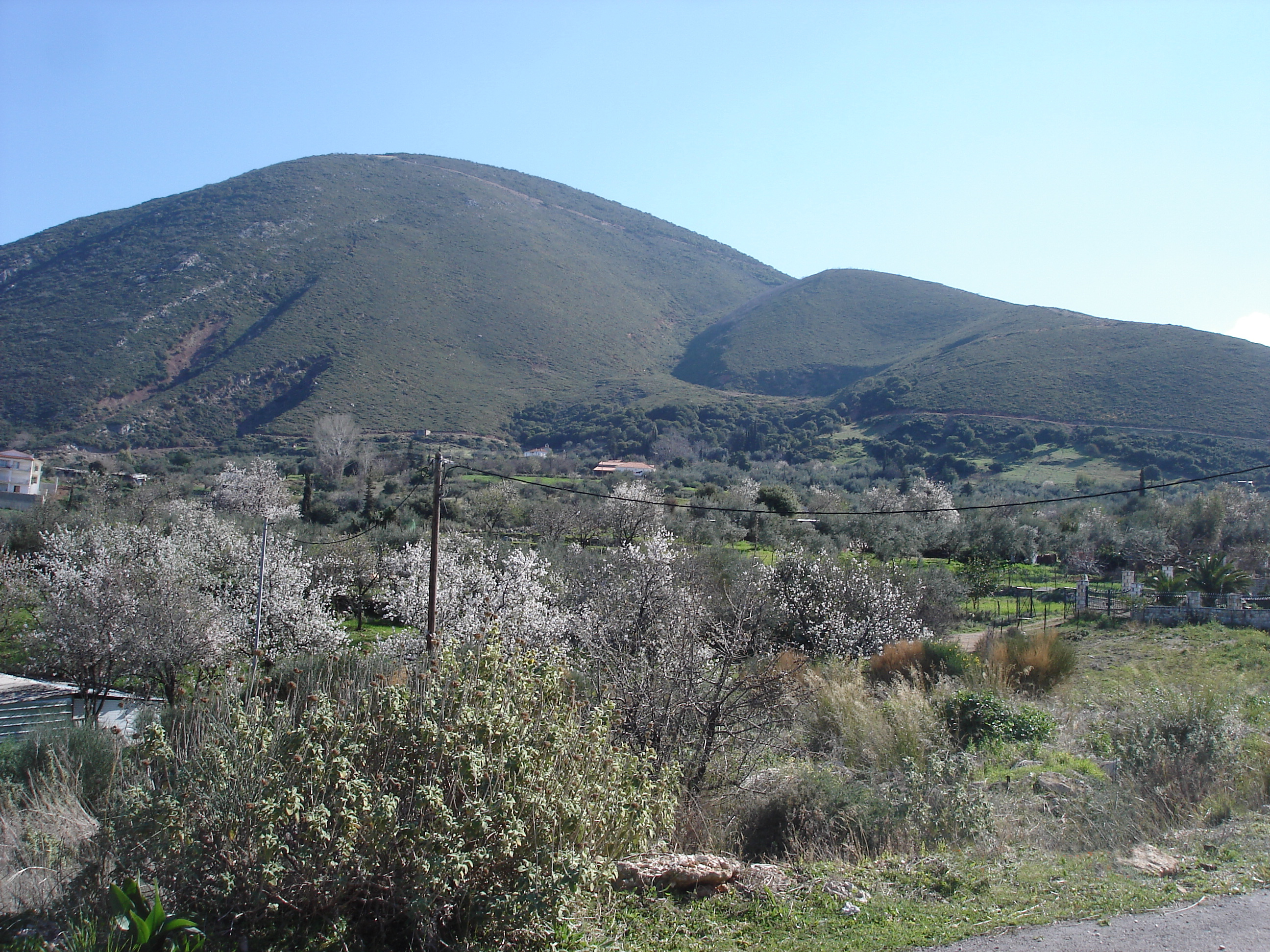 Ζωητάδα Κρήνη Πατρών, θέρετρο πολλών μαχών, αρχαιολογικός χώρος και σήμερα οικισμός